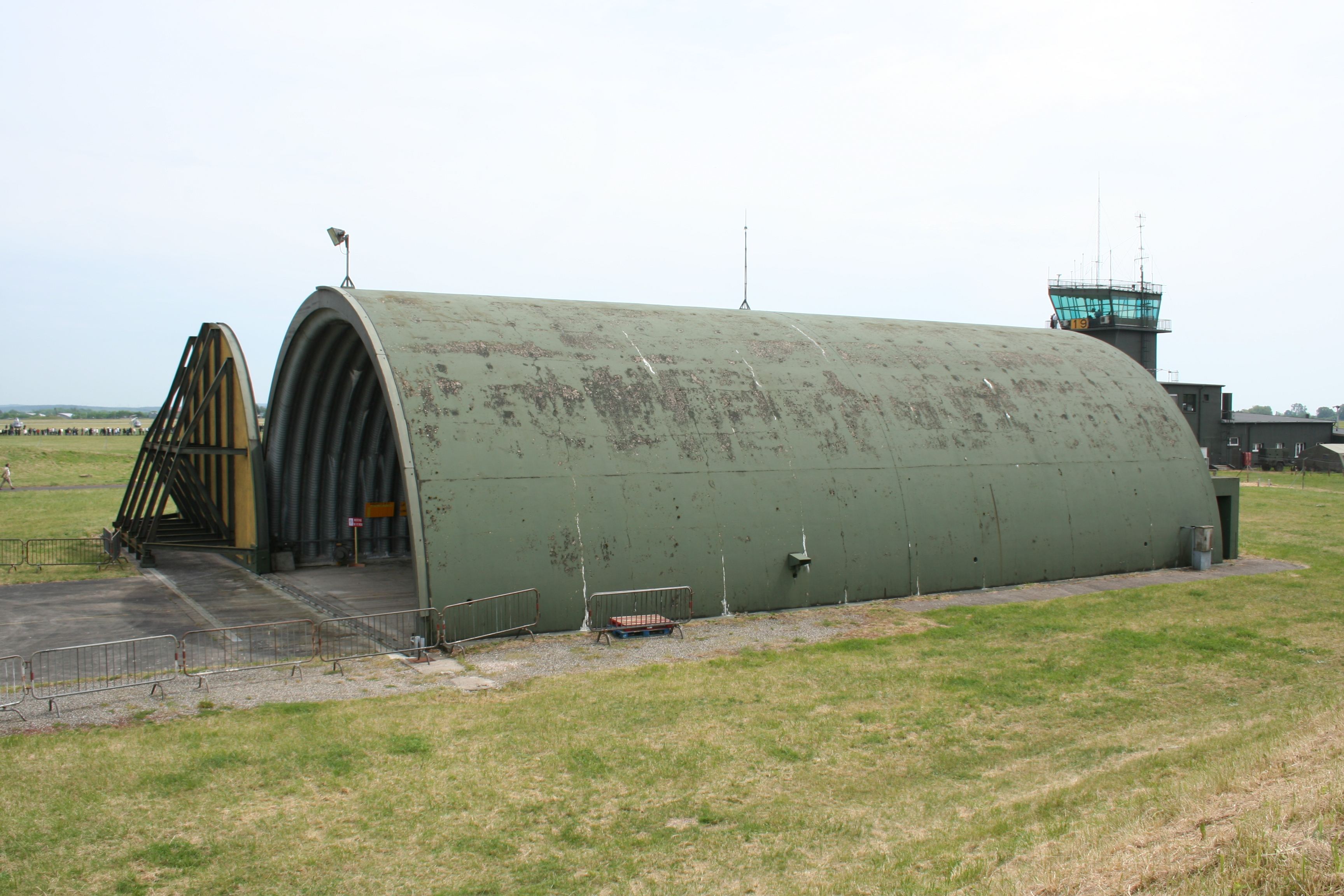 Hangar durci de la BA128 Metz